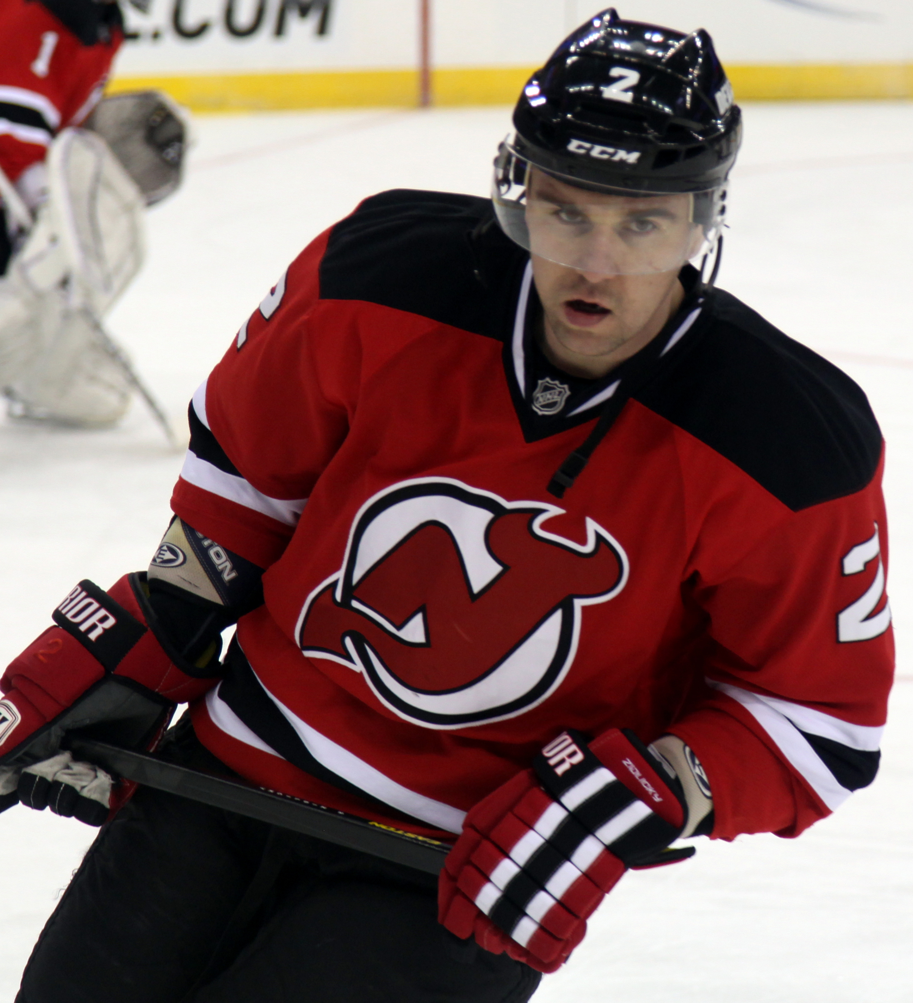 Zidlicky in 2013.